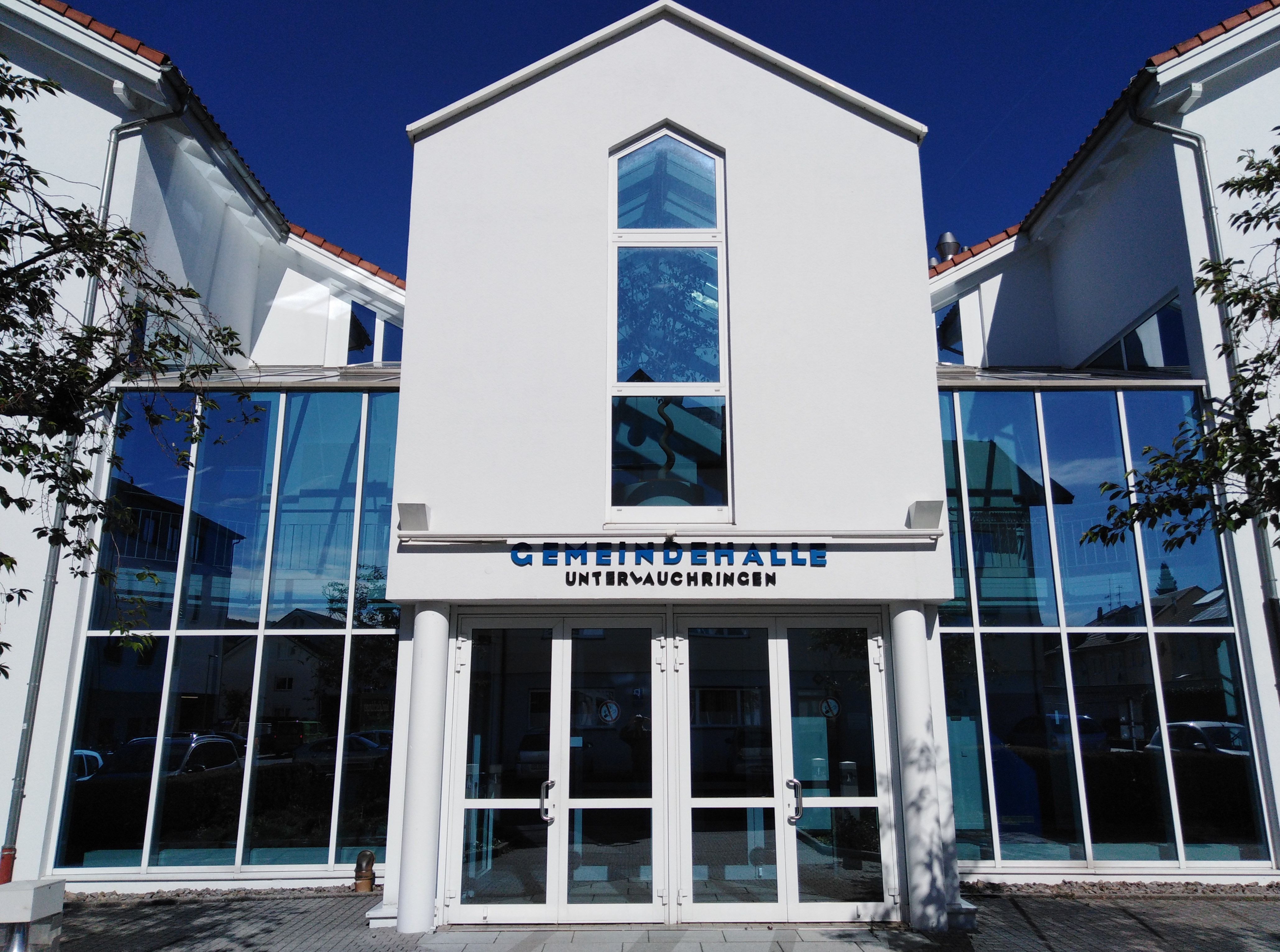 Lauchringen, Gemeinde im Landkreis Waldshut in Baden Württemberg. Eingangsbereich der Gemeindehalle in Unterlauchringen.